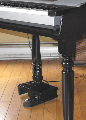 Vue du pédalier du meuble piano peinturé en noir